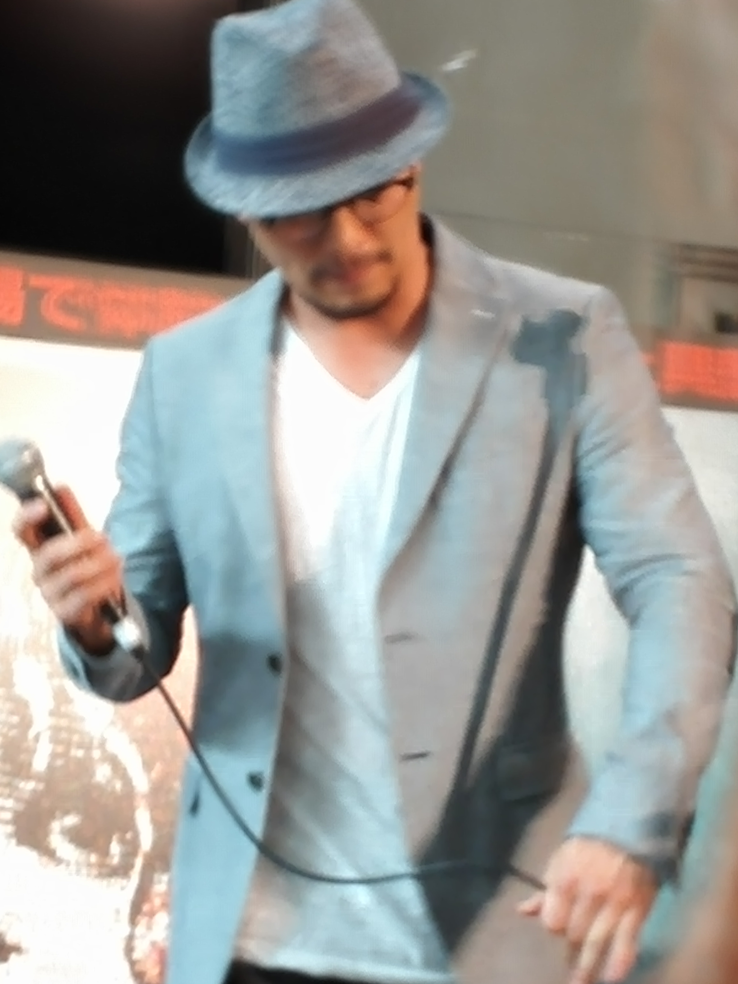 中日劇場オープニングイベントにて歌唱披露。